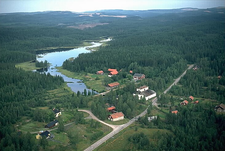 Motiv: Motjärnshyttan Nyckelord: Byggnadsminnen, Flygbilder, Riksintressen Kategori: Bergmansby Motjärnshyttan. Länsväg 246 passerar igenom.